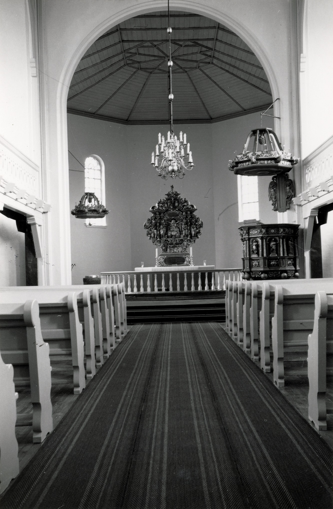 Interiør i Nes kirke, Akershus. Foto: Ola Øgar Svendsen, fra Kulturminnebilder.no.